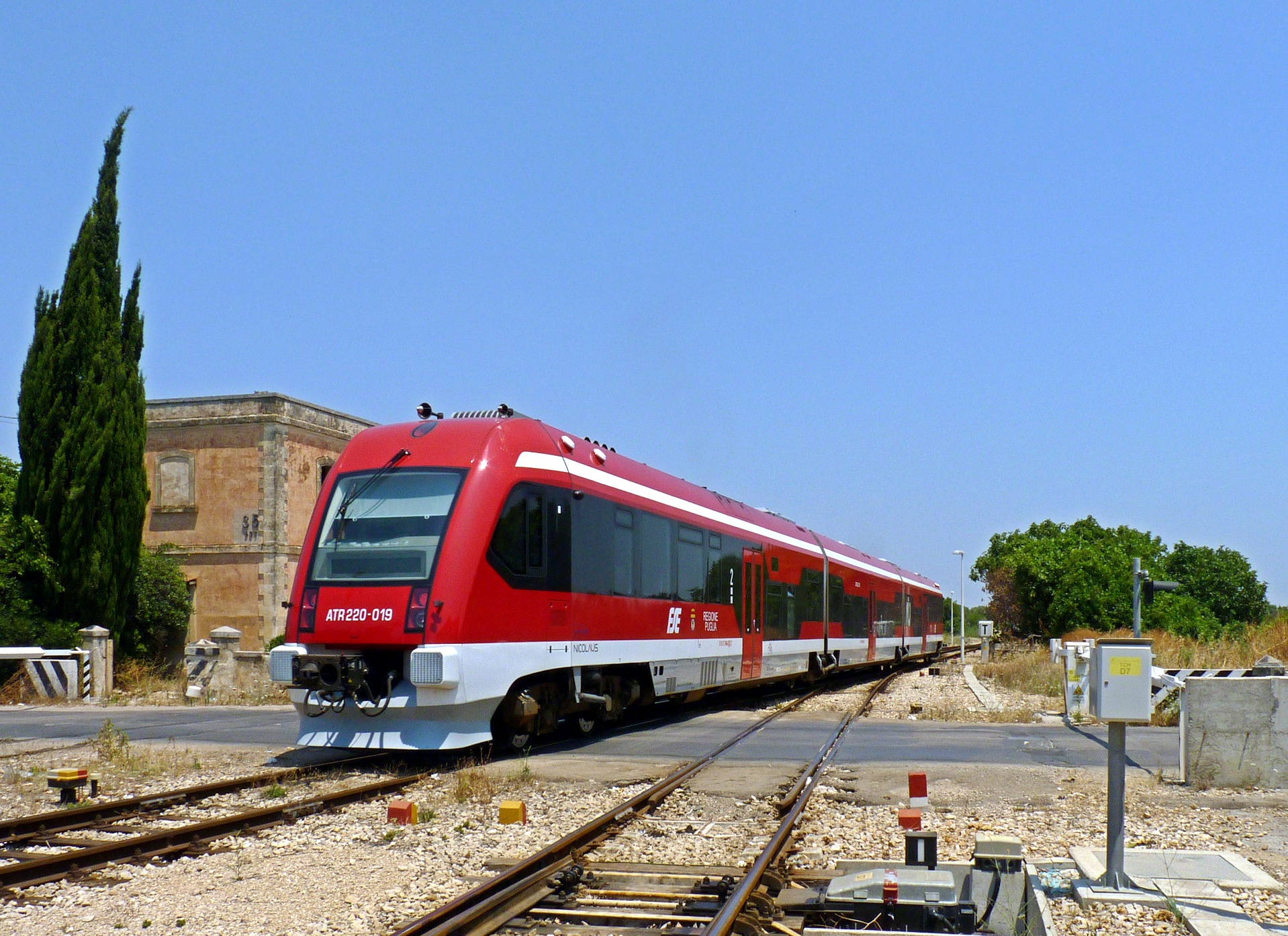 Autotreno ATR 220 delle Ferrovie del Sud Est in arrivo a Nardò